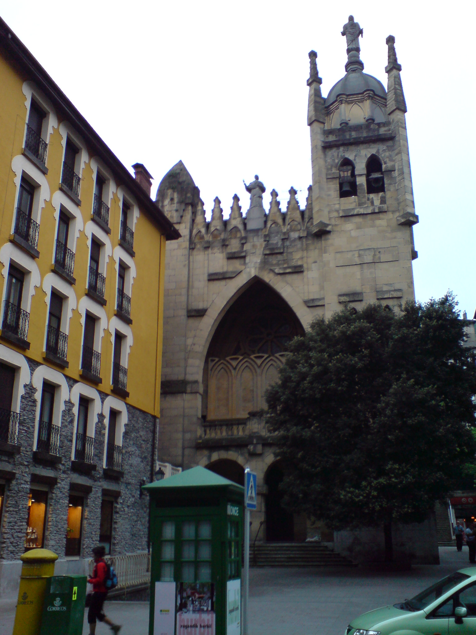 Tolosa Plaza Iturritxiki. Al fondo, la iglesia, actualmente cerrada, del Corazón de María (ex PP Claretianos)